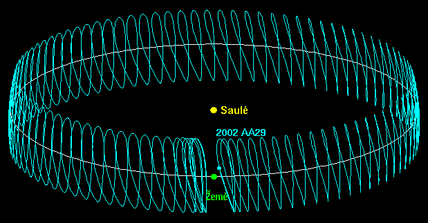 2002aa29-orbit.png vertimas į lietuvių kalbą….